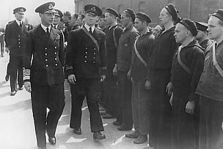 King George VI inspecting the crew of the Norwegian destroyer HNoMS Draug at Portsmouth. (Info from Hansen, Ola Bøe (ed.): "Sjøkrigens skjebner - deres egne beretninger", Sjømilitære Samfund ved Forlaget Norsk Tidsskrift for Sjøvesen, Gjøvik 2005 ISBN 82-92217-22-3 p. 92-93)